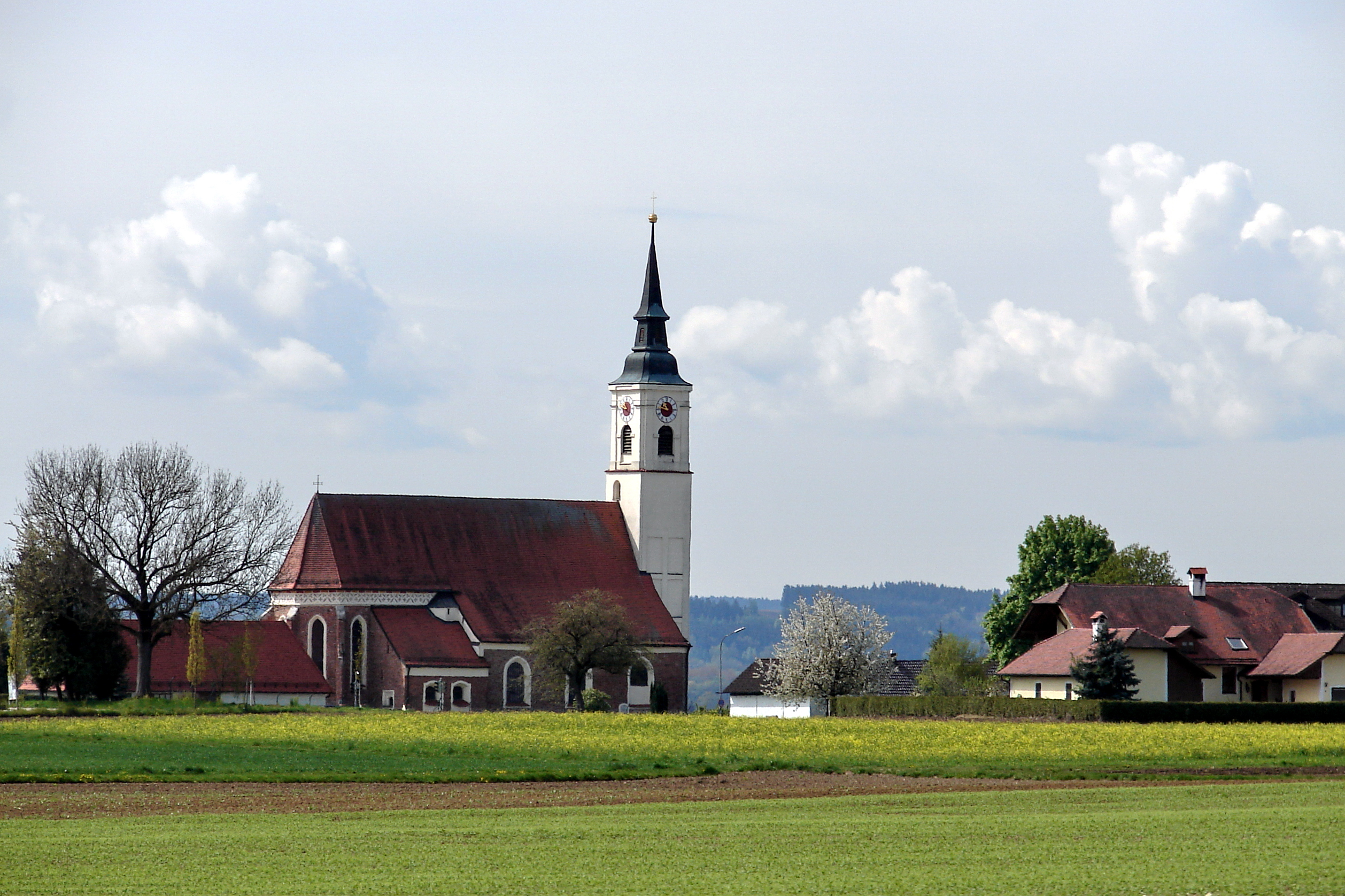 Die römisch-katholische Pfarrkirche Mariä Heimsuchung ist ein denkmalgeschütztes Kirchengebäude in Altdorf im Landkreis Landshut (Bayern).